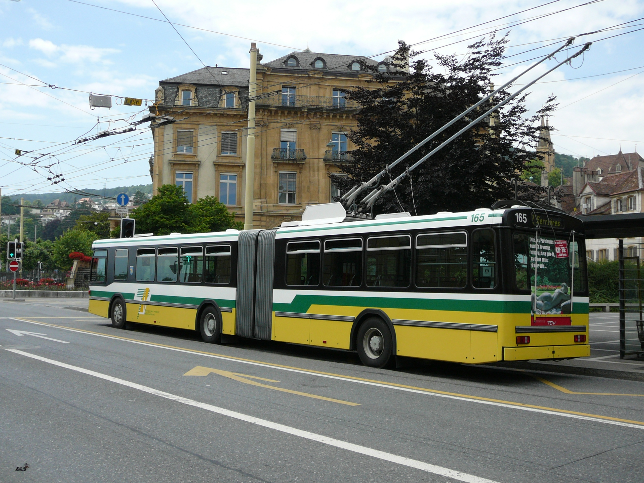 Trolleybus des TN